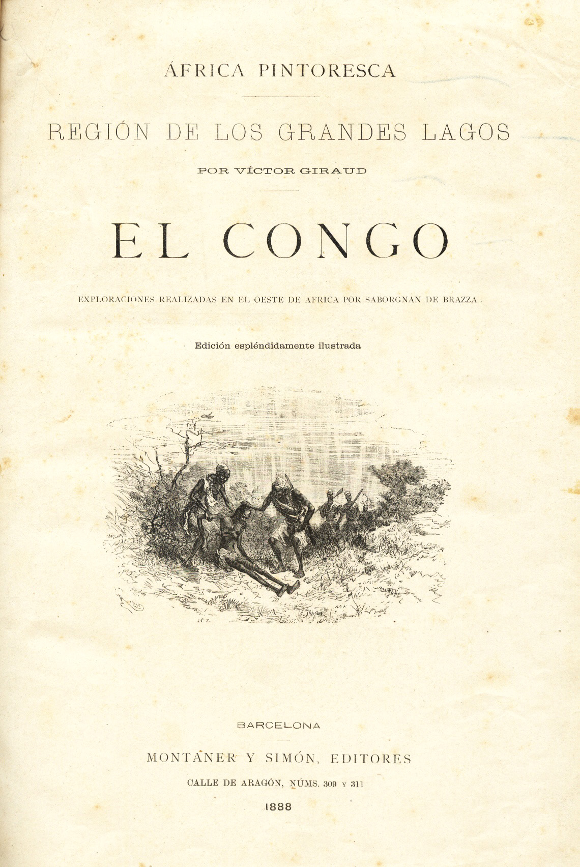 Portada. Victor Giraud. "Africa pintoresca. Región de los Grandes Lagos". Barcelona 1888